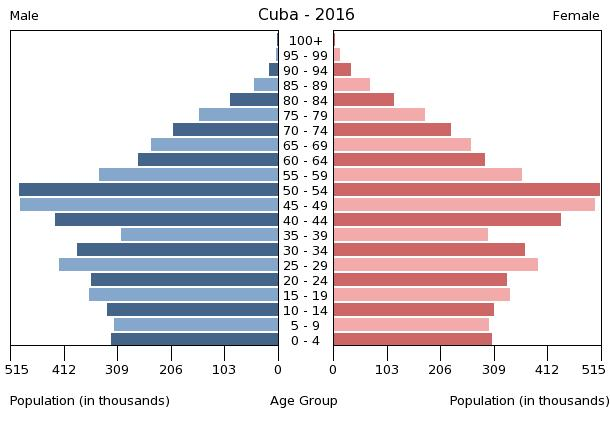 A population pyramid illustrates the age and sex structure of a country's population and may provide insights about political and social stability, as well as economic development. The population is distributed along the horizontal axis, with males shown on the left and females on the right. The male and female populations are broken down into 5-year age groups represented as horizontal bars along the vertical axis, with the youngest age groups at the bottom and the oldest at the top. The shape of the population pyramid gradually evolves over time based on fertility, mortality, and international migration trends.